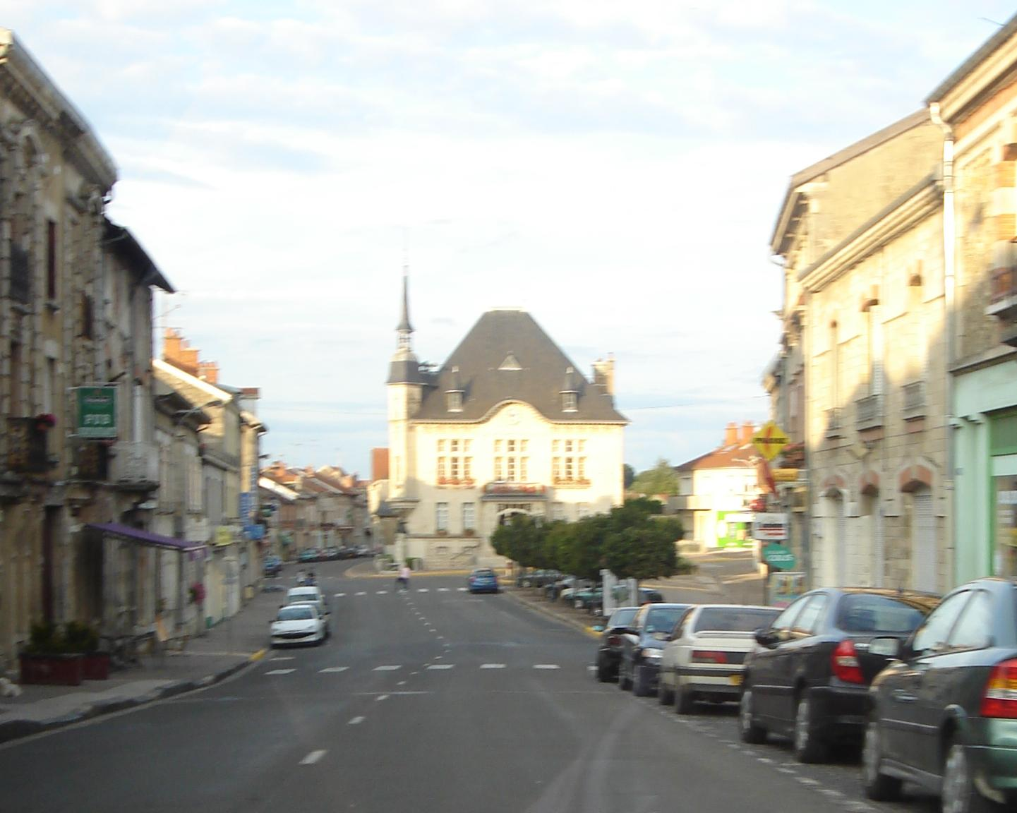 La place de l'hotel de ville a Sermaize-les-Bains